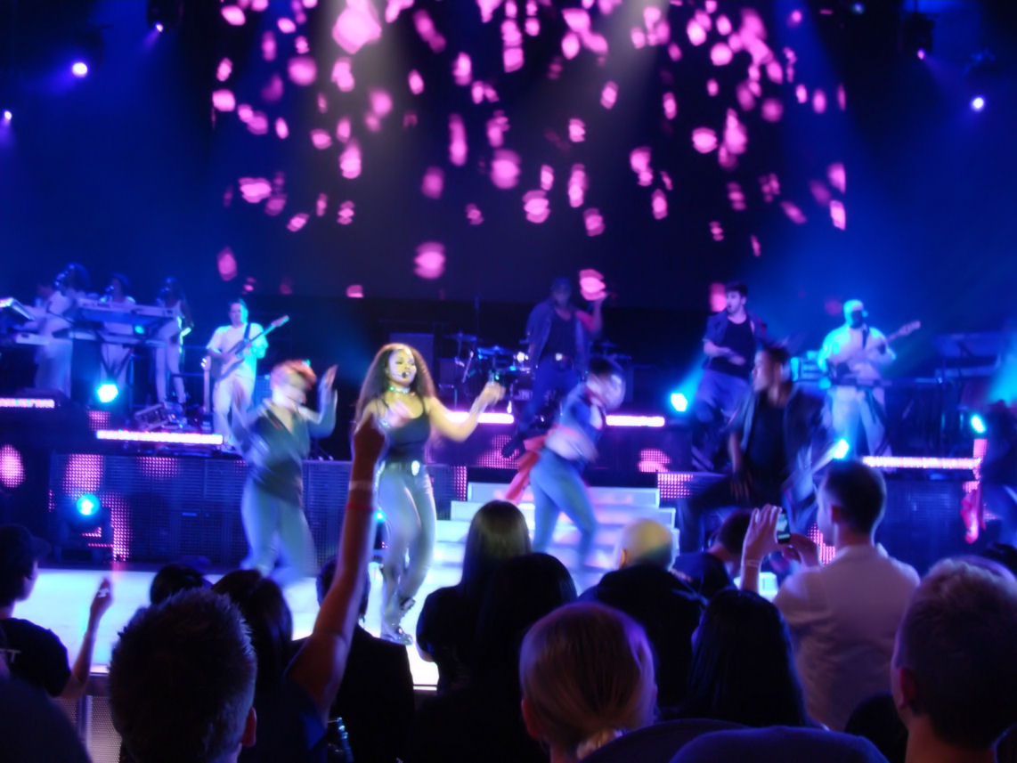 45 - Janet Jackson - Royal Albert Hall 2-7-2011